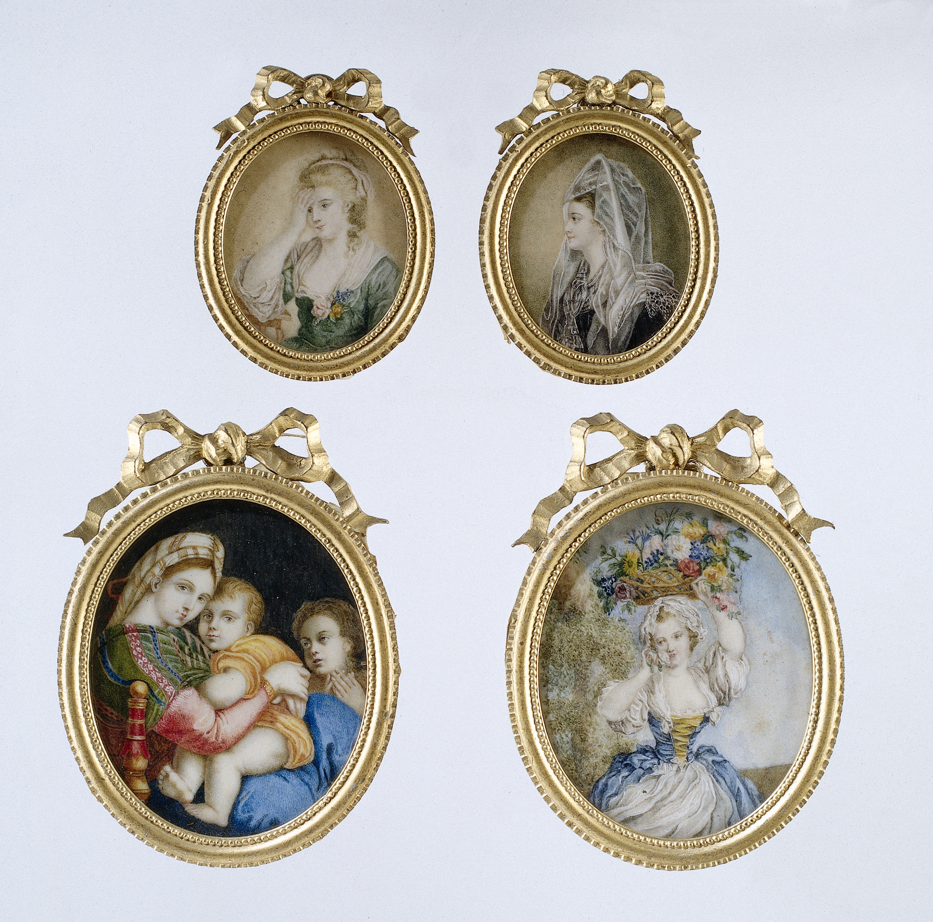 Schilderij met voorstelling van een vrouw met opgeheven rechterarm. De vrouw is ten halven lijve afgebeeld, gekleed in 18de-eeuwse dracht, bestaande uit een groene jurk met witte battisten omslagdoek en manchetten en bloemcorsage op de borst. Haar grijsblonde haren opgestoken met lint. Gevat in een ovale lijst van metaal in neo-klassicistische stijl met parel- en ribbelrand, bekroond door strik.